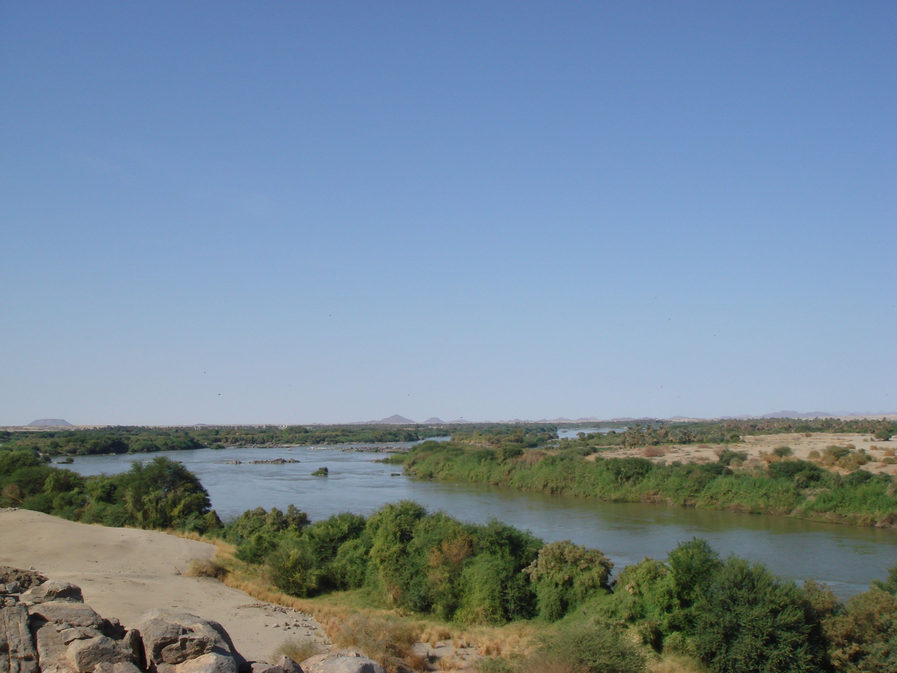 Une image de la cinquième cataracte du Nil au Soudan